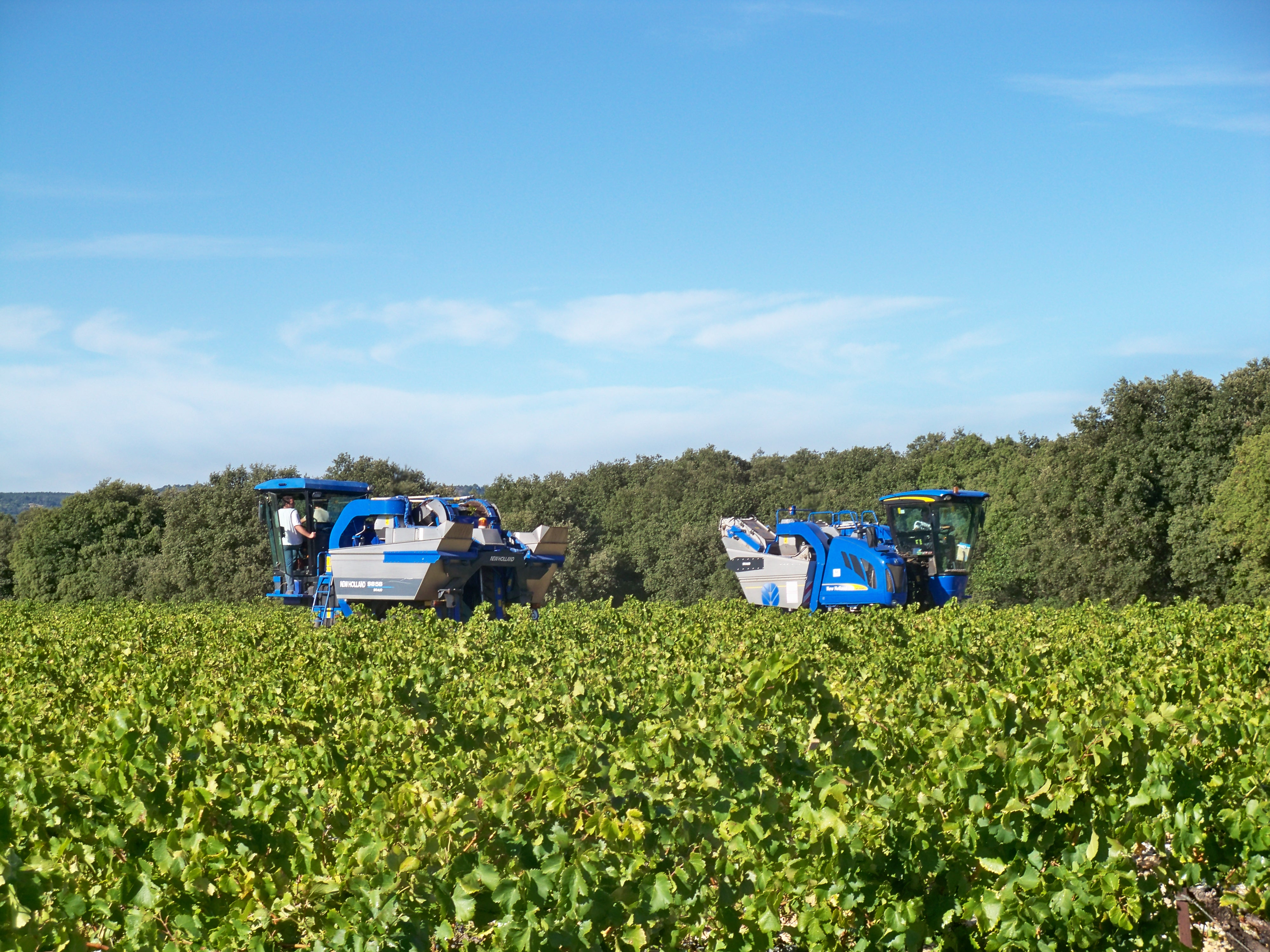 Machines à vendanger dans le vignoble du Plan de Dieu (Vaucluse, France), New Holland (Braud)